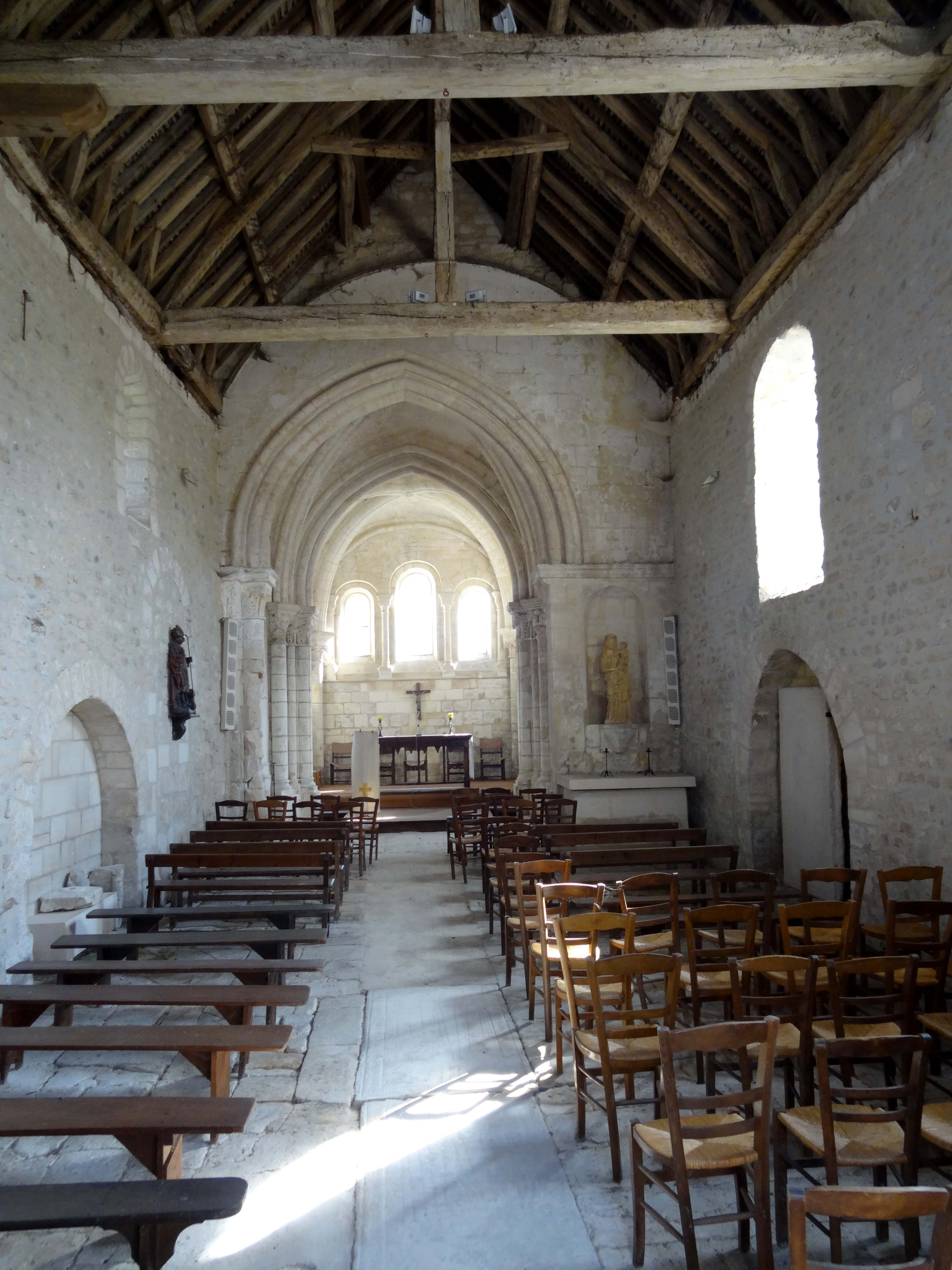 Intérieur de l'église - voir titre.